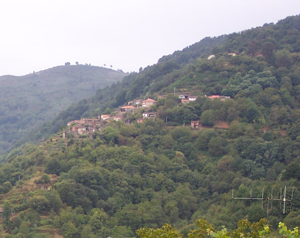 San Lourenzo, Temes, Carballedo